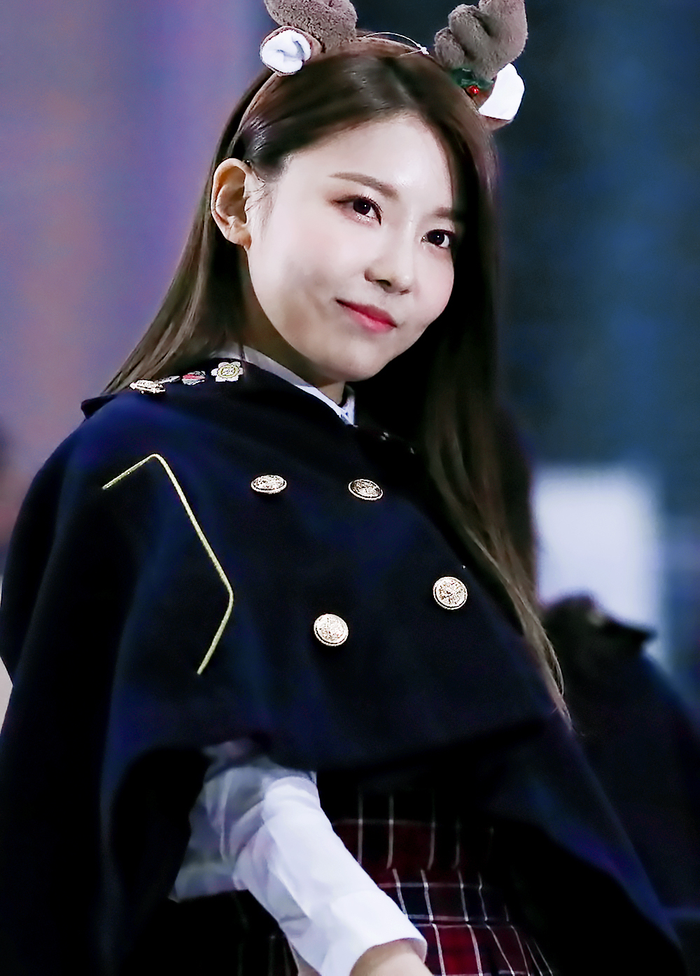 171215 코엑스 팬싸인회 구구단